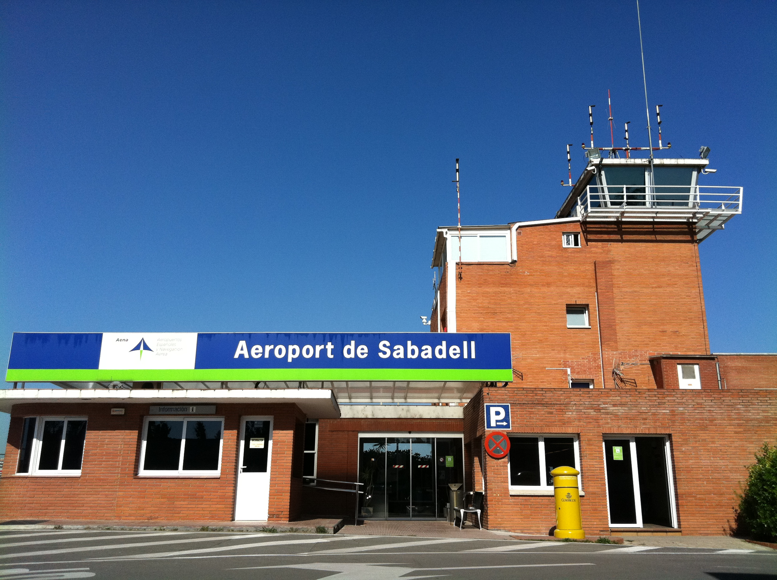 Sabadell Airport entry